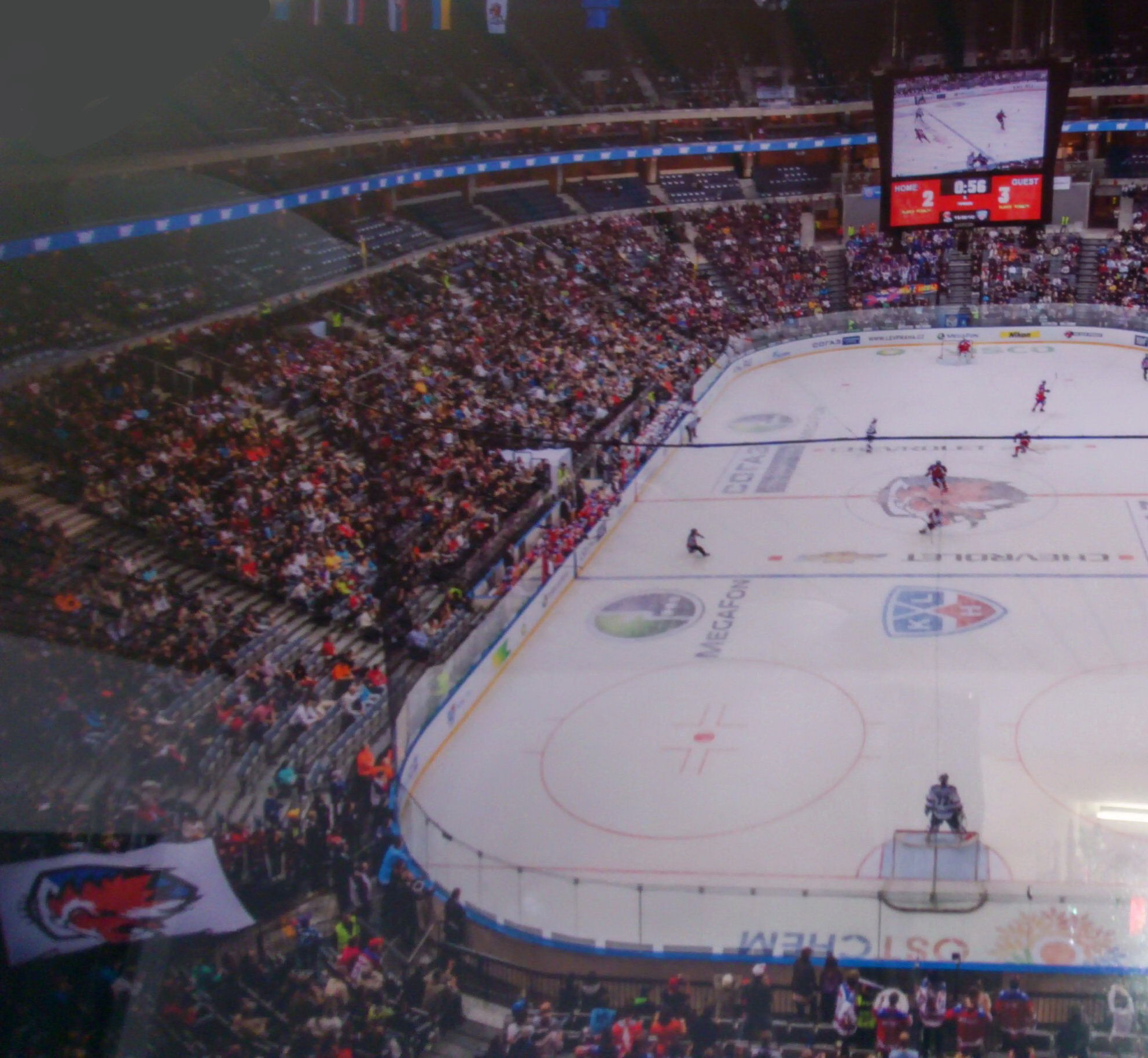 Zápas HC Lev Praha